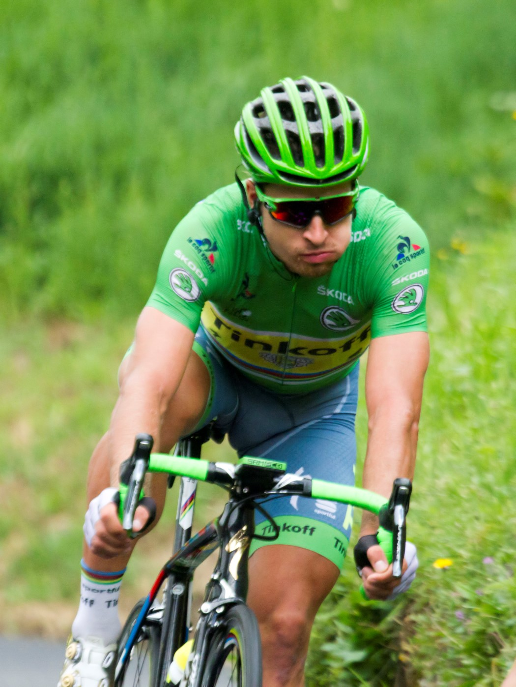 9218 sagan